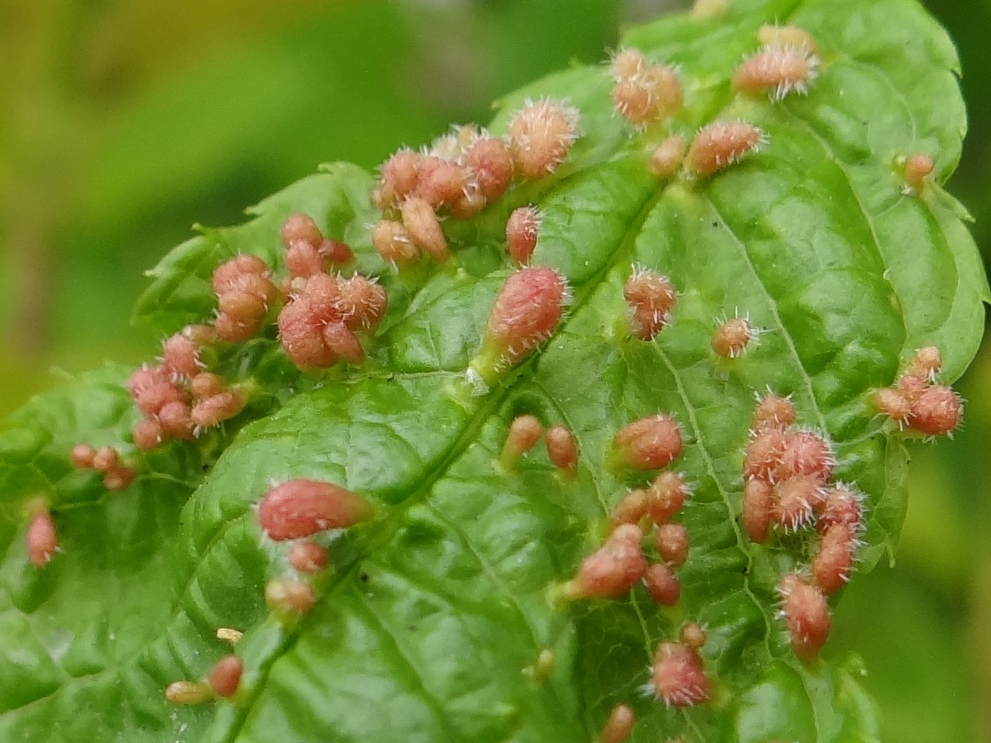 Phyllocoptes eupadi on leaf on Padus avium.Location: Poland, Kraków, Wzgórza Tynieckie